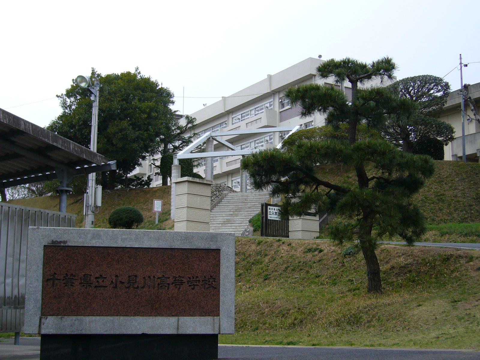 omigawa high school,chiba,japan